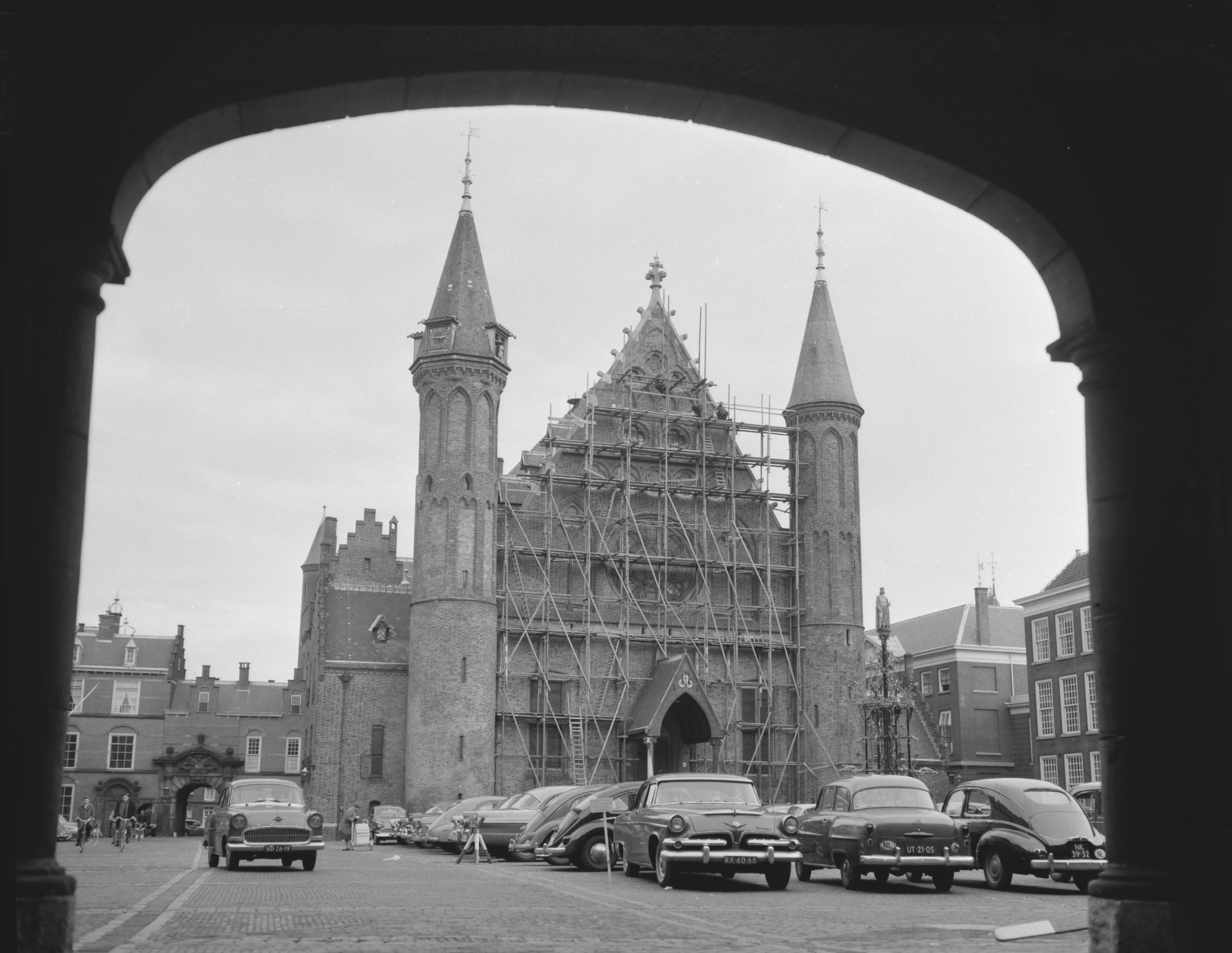 Collectie / Archief : Fotocollectie Anefo Reportage / Serie : [ onbekend ] Beschrijving : Ridderzaal krijgt schoonmaak- en restauratiebeurt Datum : 4 november 1958 Locatie : Den Haag, Zuid-Holland Instellingsnaam : Ridderzaal Fotograaf : Rossem, Wim van / Anefo Auteursrechthebbende : Nationaal Archief Materiaalsoort : Negatief (zwart/wit) Nummer archiefinventaris : bekijk toegang 2.24.01.04 Bestanddeelnummer : 909-9518